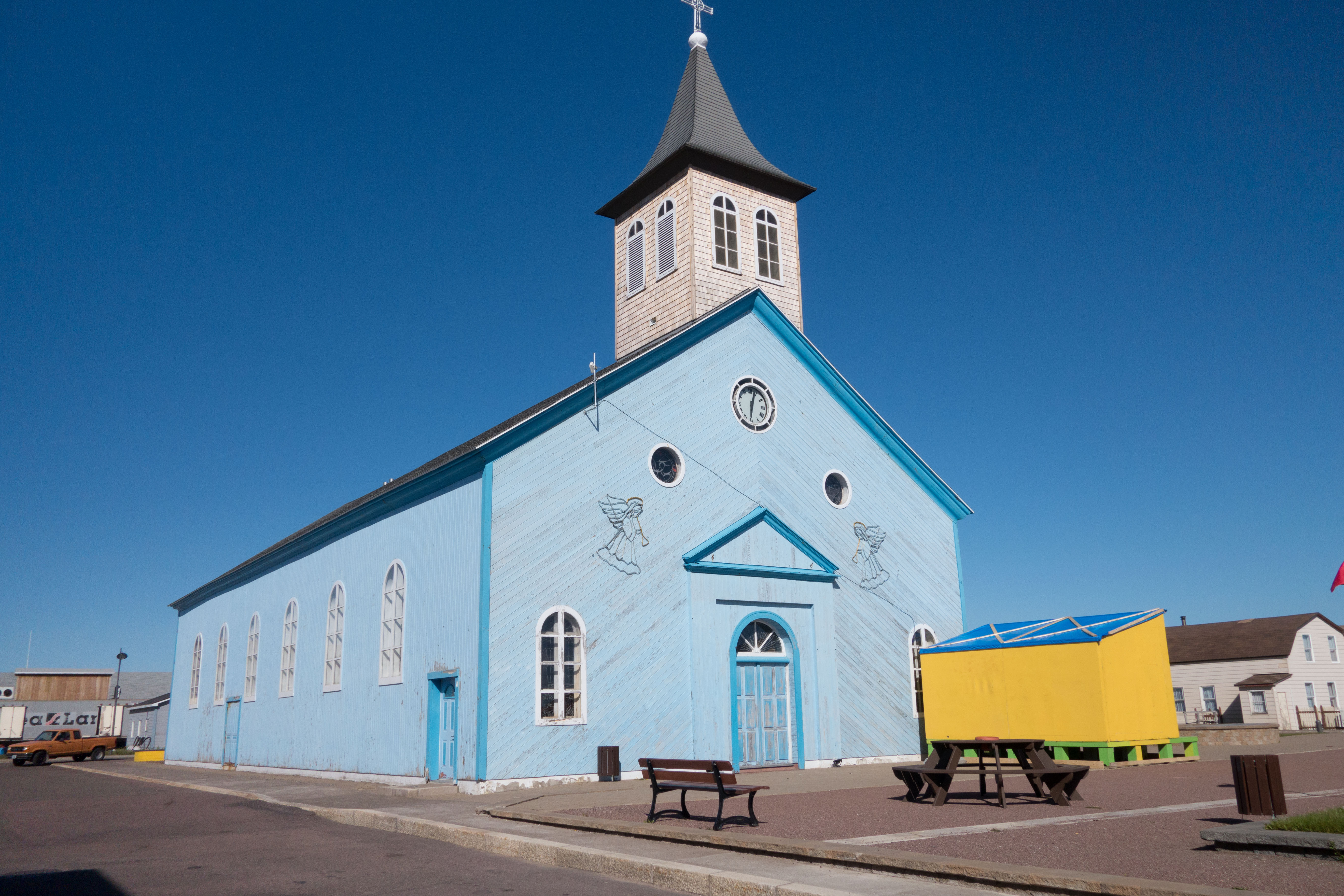 Église Notre-Dame-des-Ardilliers de Miquelon